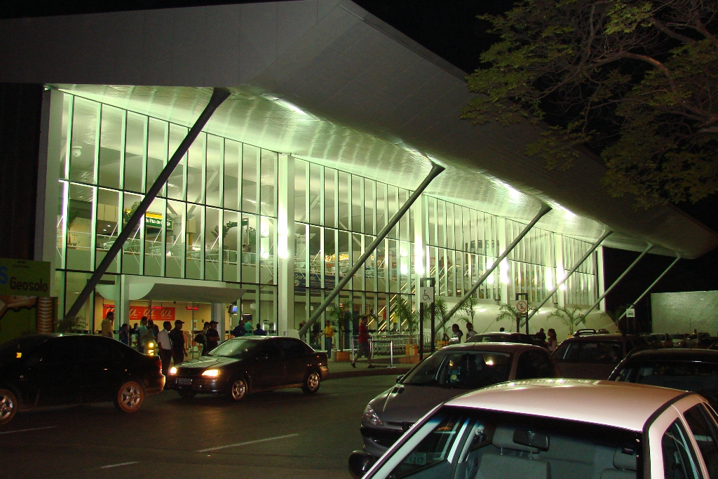 Vista externa do Aeroporto Internacional Marechal Rondon